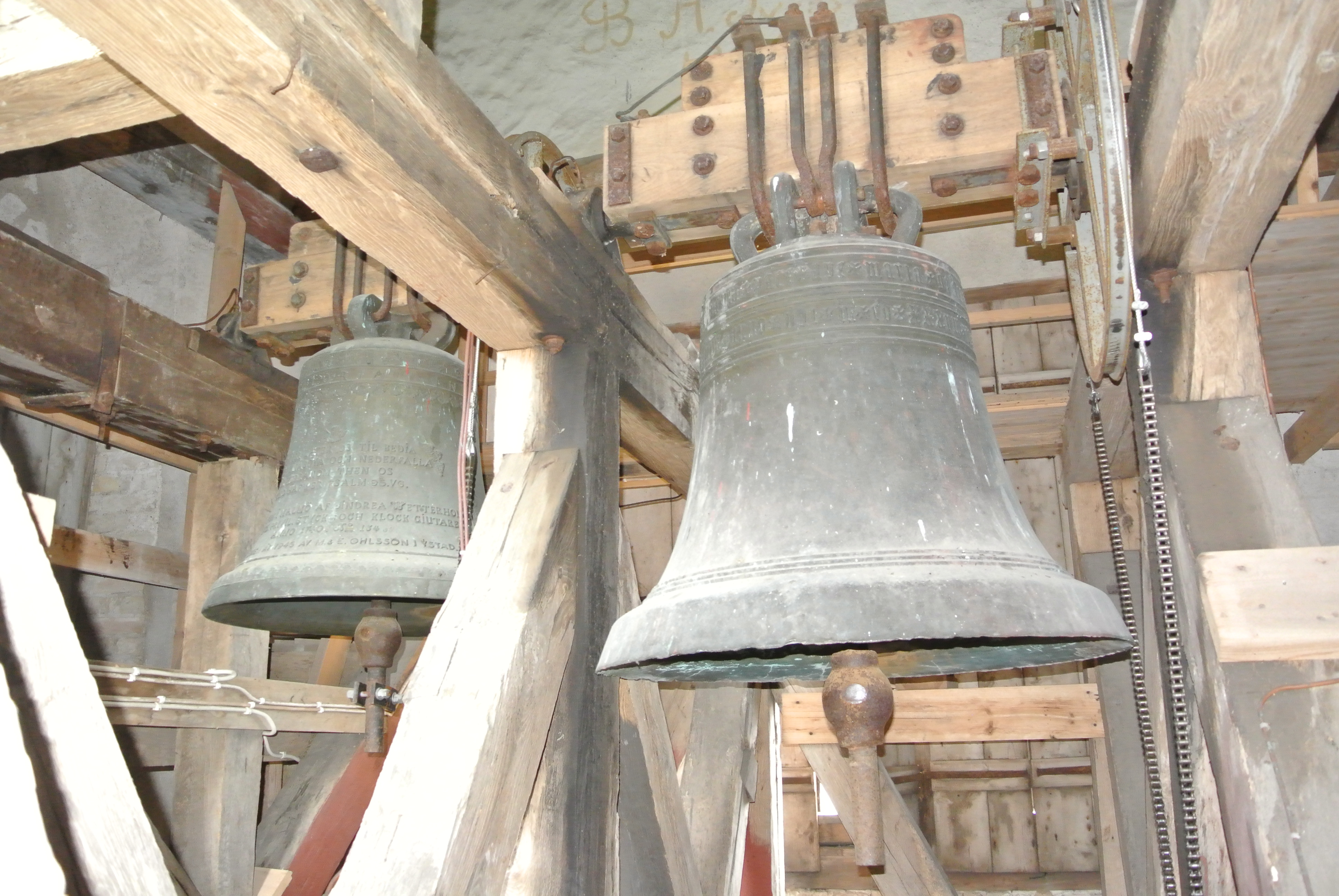 Häglinge kyrkas klockor